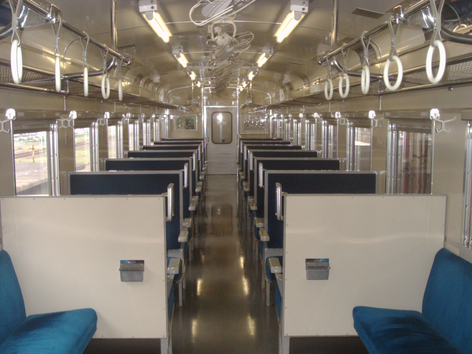 JR北海道オハ510-1車内 (釧路駅にて)